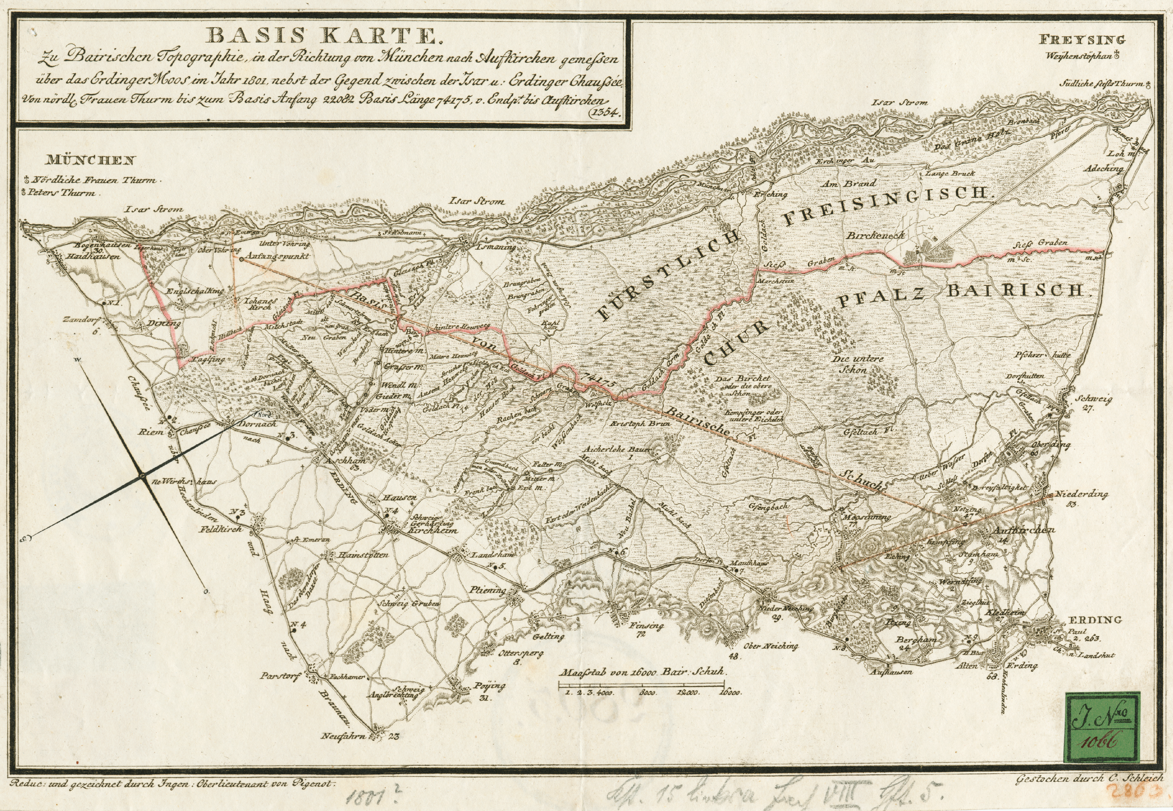 Basiskarte 1801 von München nach Aufkirchen